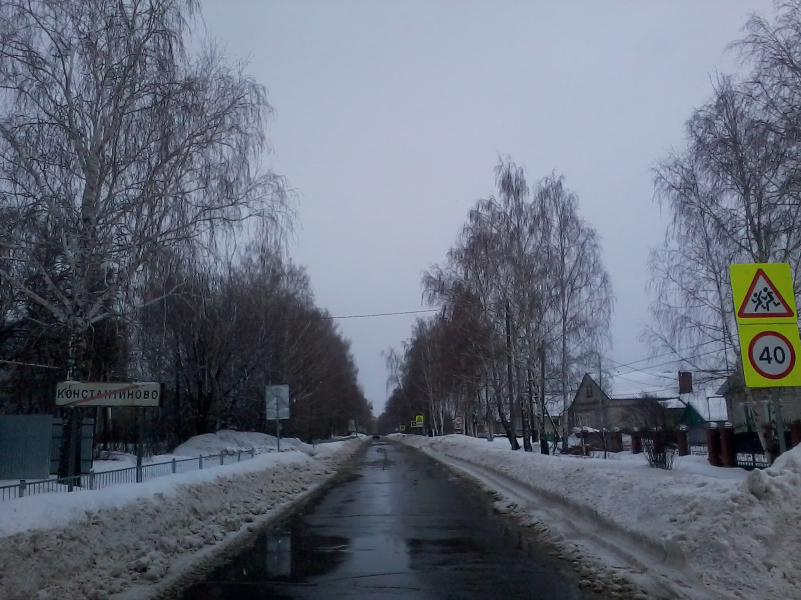 На границе с Константиново